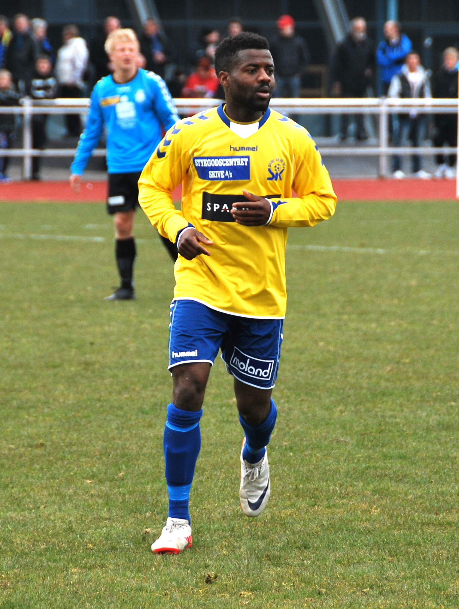 Fodboldspilleren Ayinde Jamiu Lawal fra Skive IK. Her under en 1. divisionskamp mod Blokhus FC på Skive Stadion.